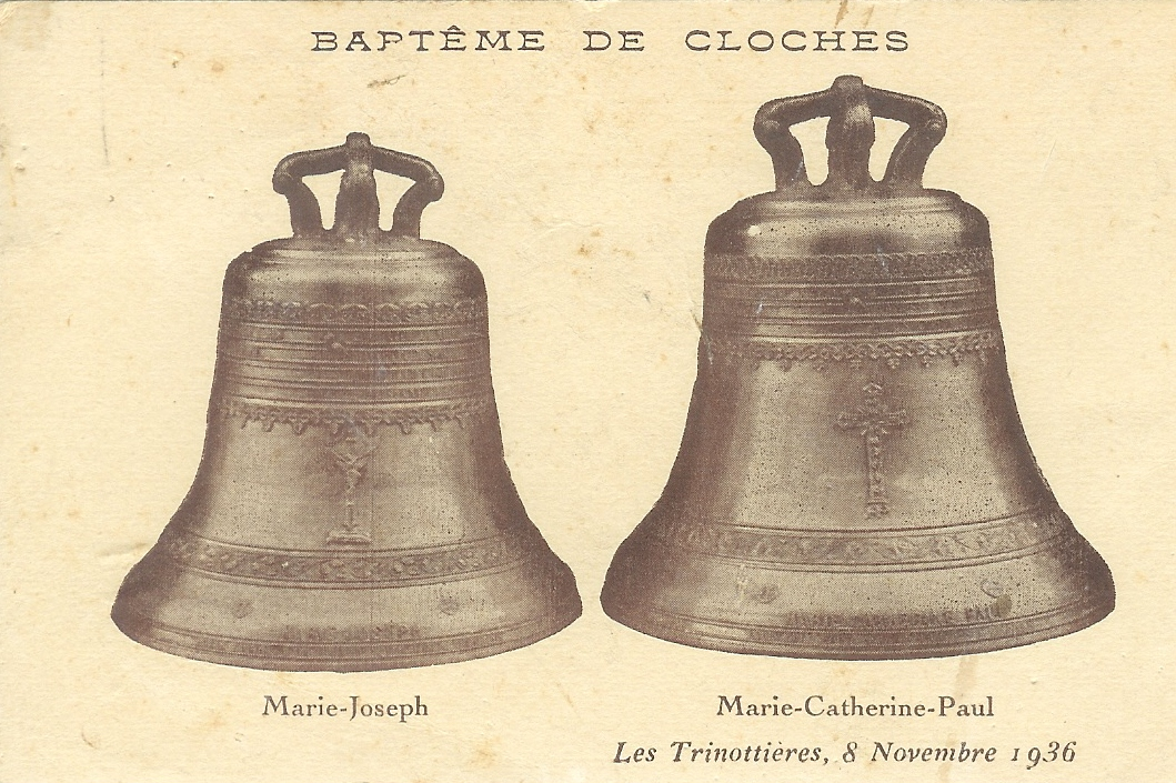 Cloches de l'église des Trinottières à Montreuil-sur-Loir 49140 - France